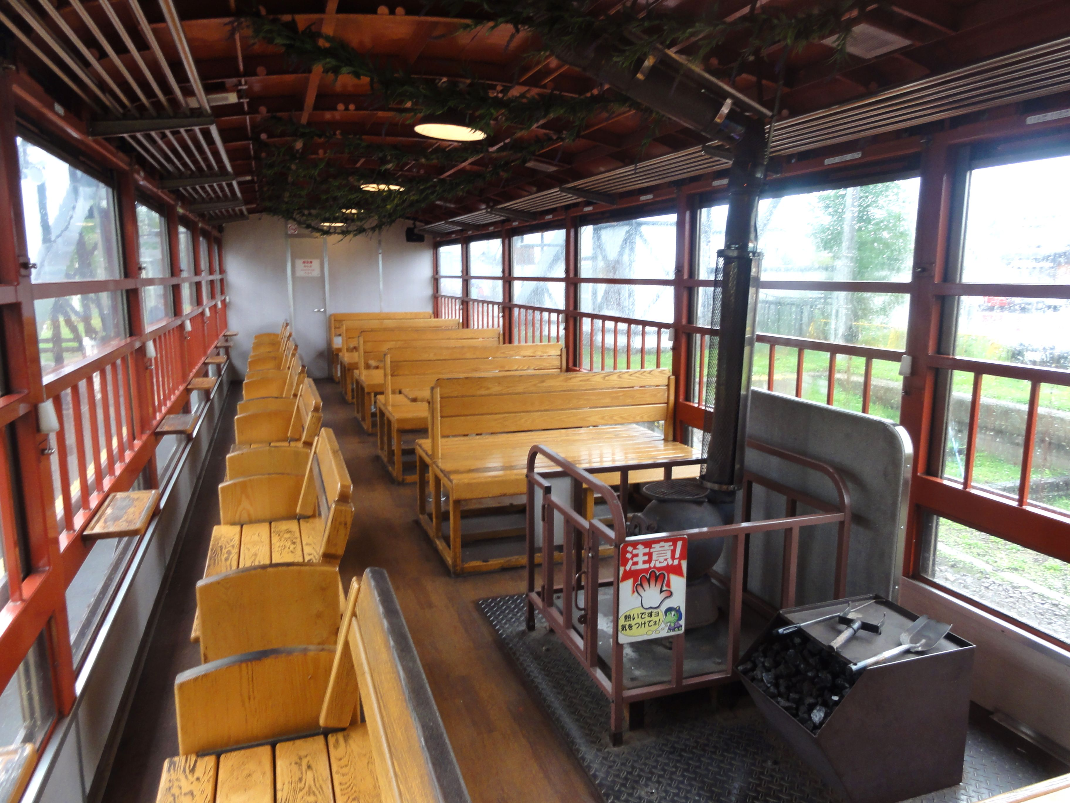 オハテフ510-51・車内